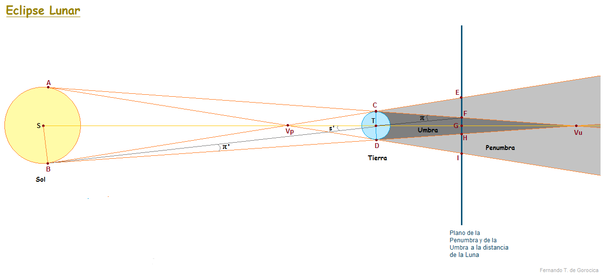 CONTACTOS INTERIORES Y EXTERIORES DE LA LUNA CON LA PENUMBRA Y LA UMBRA.